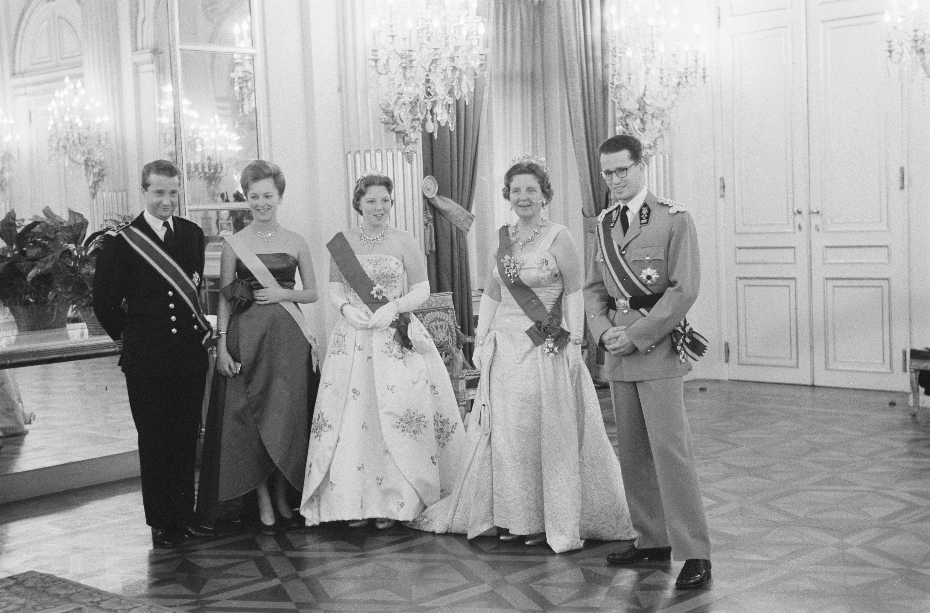 Collectie / Archief : Fotocollectie Anefo Reportage / Serie : [ onbekend ] Beschrijving : Tweede dag van het Koninklijk bezoek aan Belgie, aankomst en bezoek aan Plantijnmuseum, v.l.n.r. Prins Albert, Prinses Paola, Prinses Beatrix, Koningin Juliana, Boudewijn Datum : 31 mei 1960 Locatie : België Trefwoorden : aankomsten, bezoeken, koninginnen Persoonsnaam : Albert prins, Beatrix, prinses, Paola, prinses van België Fotograaf : Pot, Harry / Anefo Auteursrechthebbende : Nationaal Archief Materiaalsoort : Negatief (zwart/wit) Nummer archiefinventaris : bekijk toegang 2.24.01.05 Bestanddeelnummer : 911-3016